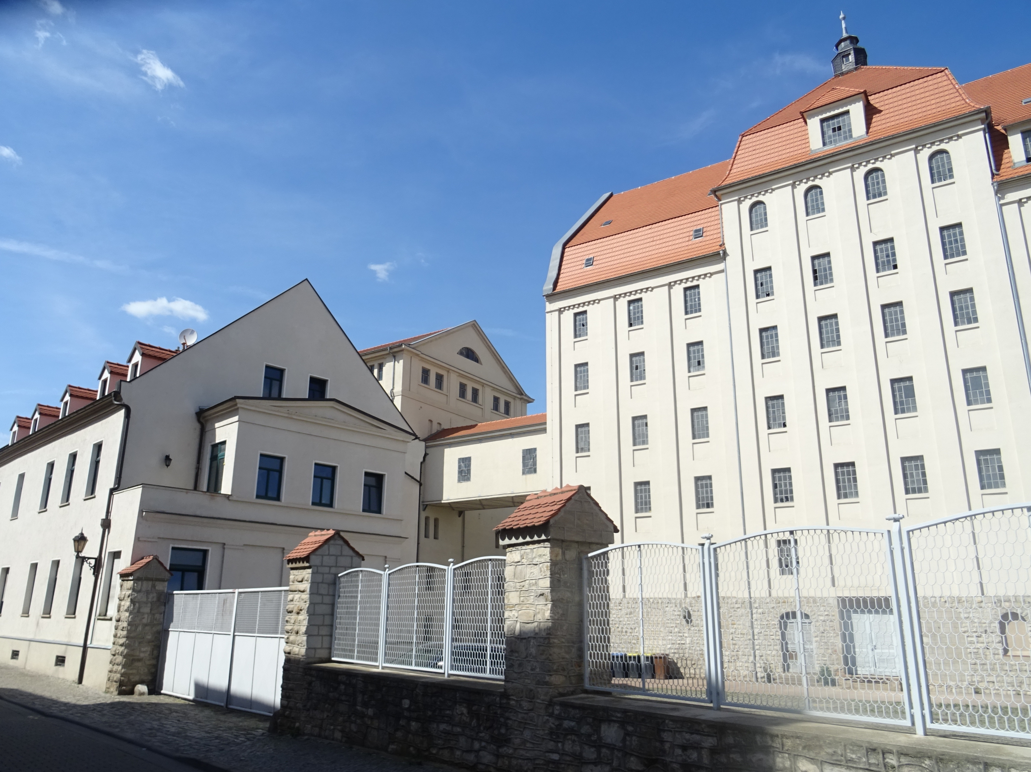 Alsleben, alte Saalemühle